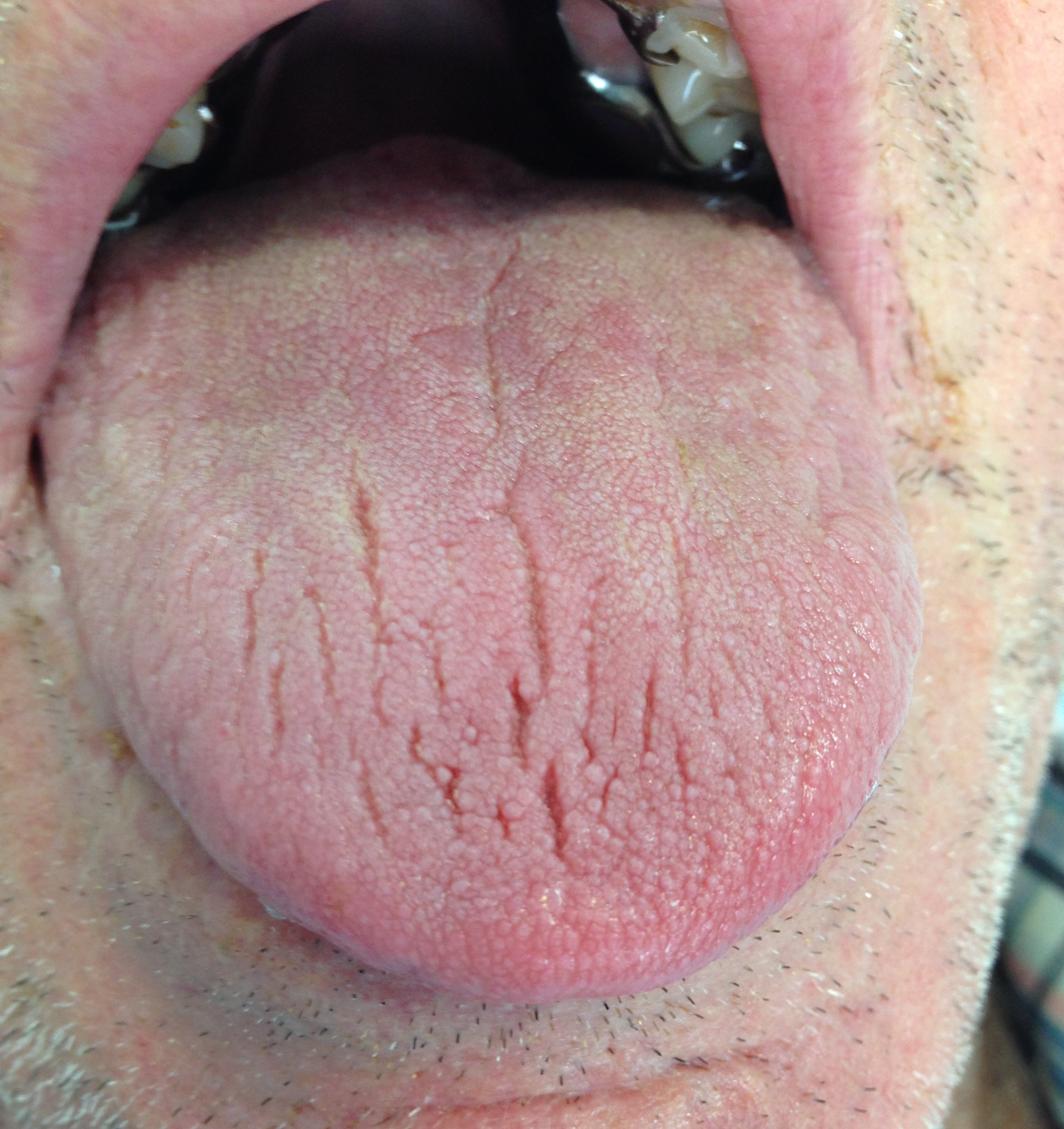 Imagen boca seca